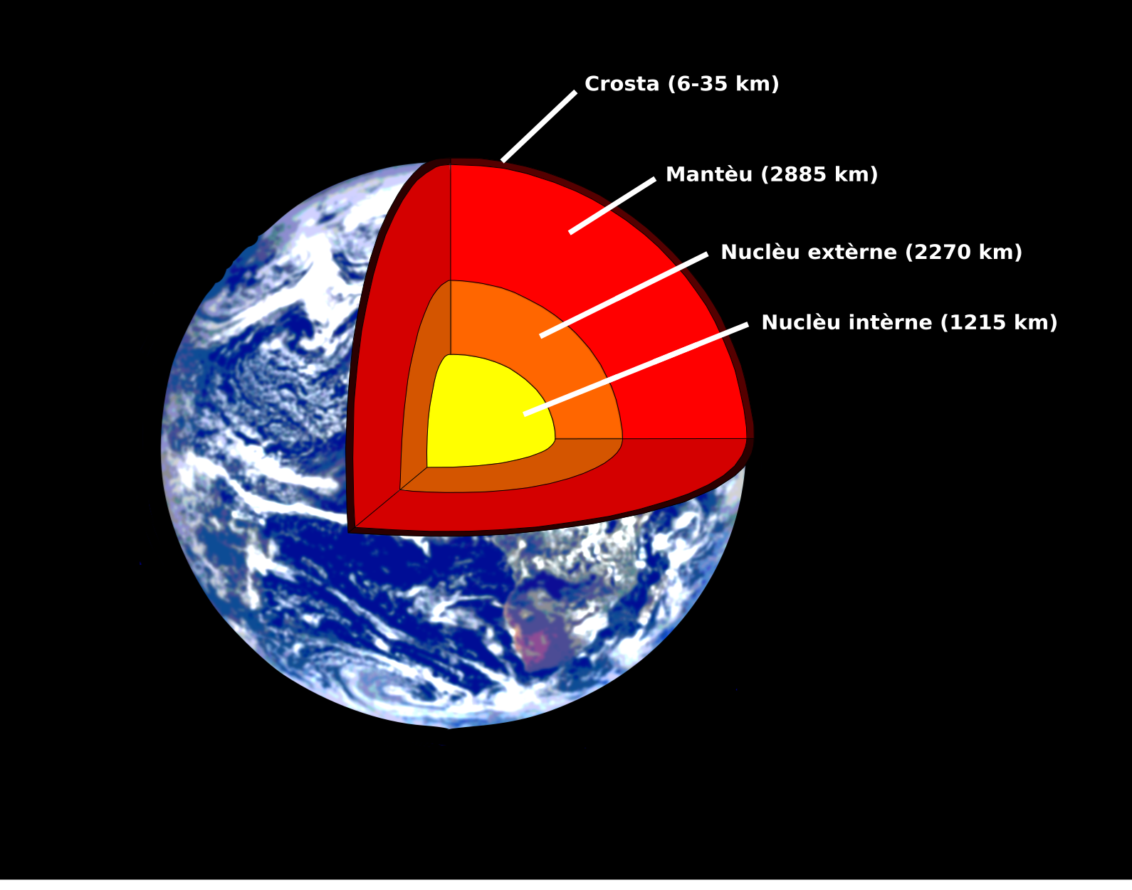 Estructura intèrna de la Tèrra.